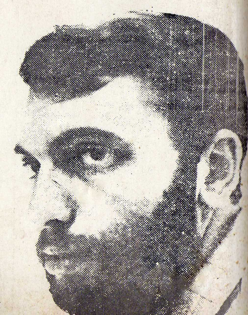 Retrato del escritor judeo argentino Ricardo Feierstein (es:1972), tomada de la contratapa de la colección de cuentos Bailate un tango, Ricardo, editada por el Centro editor de América Latina en su colección Narradores de Hoy.